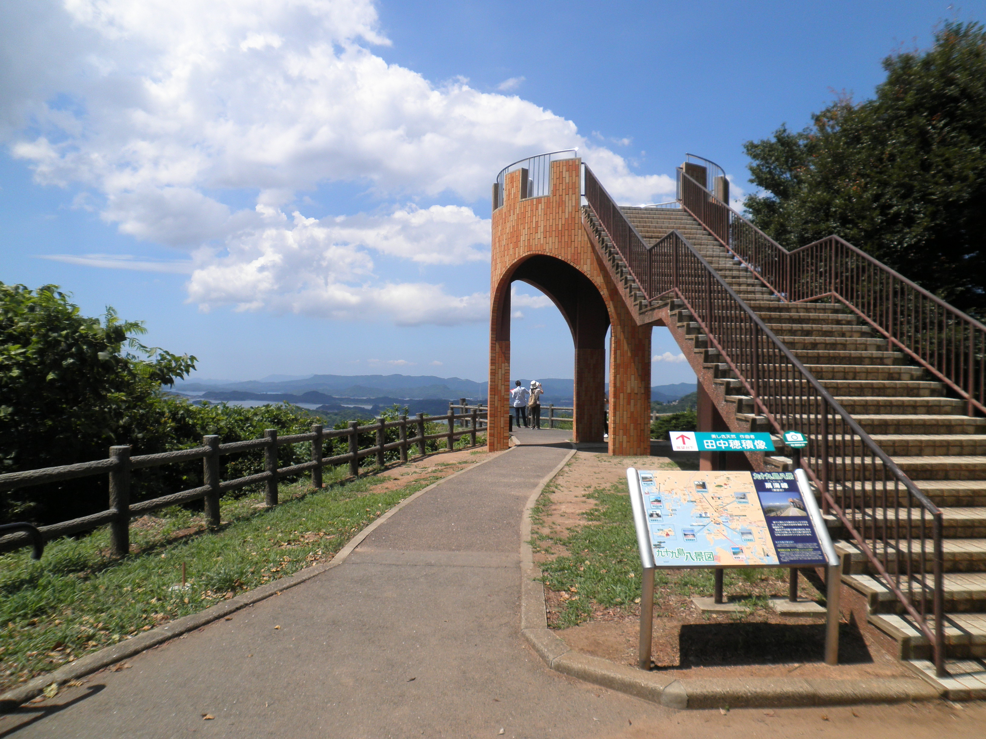 長崎県佐世保市の展海峰にある展望スペース